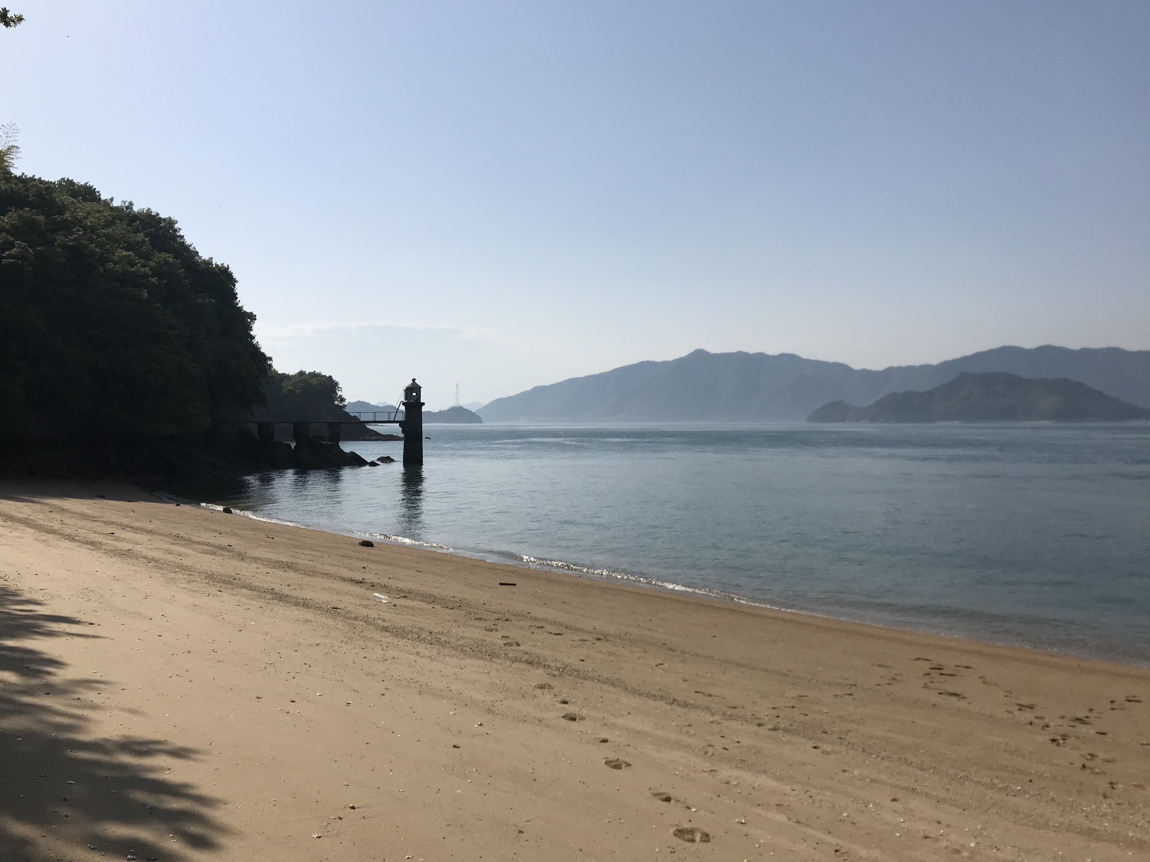 大浜埼灯台付近の砂浜より望む細島と岩子島